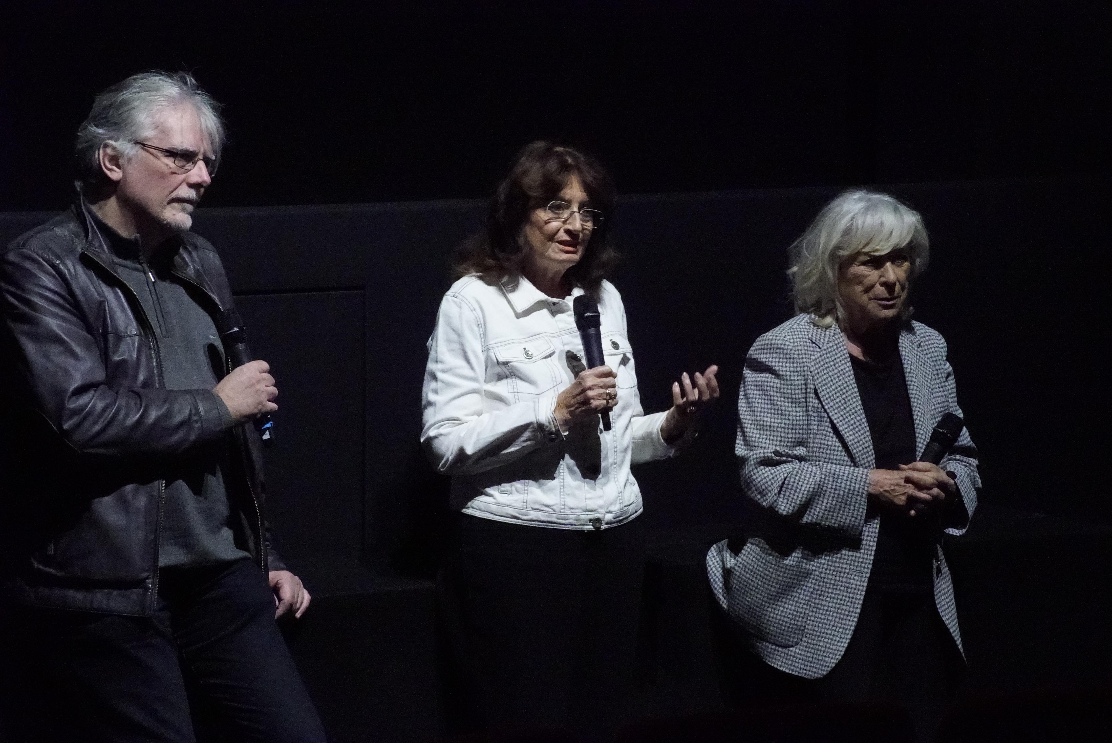 Katja Raganelli (Mitte) mit Regisseurin Margarethe von Trotta (rechts) und Stefan Drößler, Leiter des Filmmuseum München